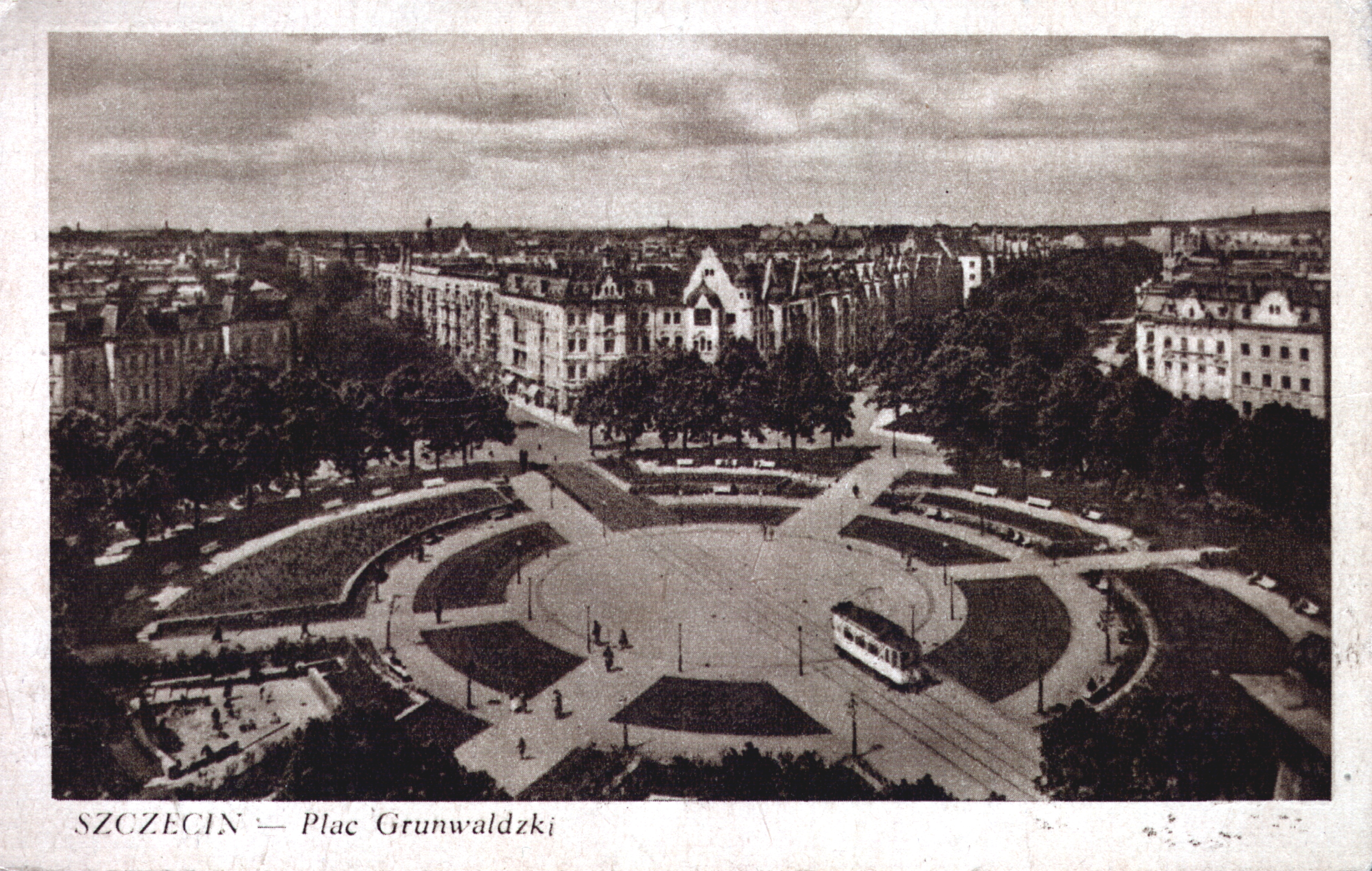 Szczecin na starej fotografii